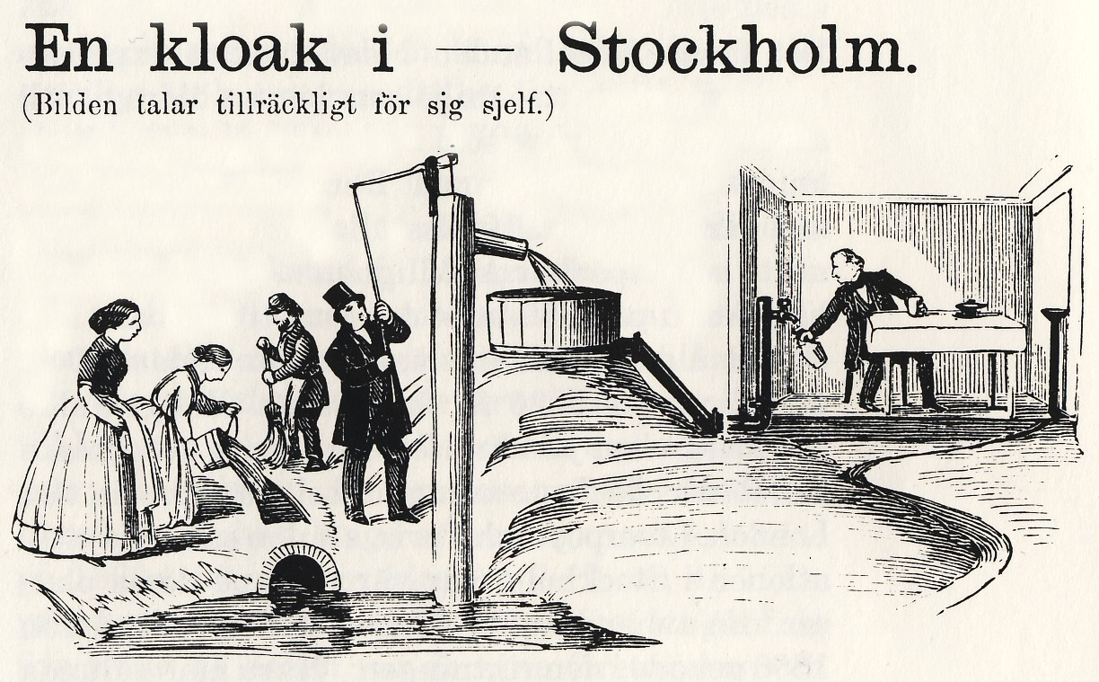 Karikatyr om vatten och avlopp i Stockholm Water comes from and returns to the sewer system.